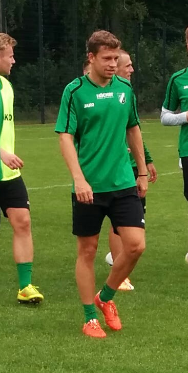 Marvin Höner bei einem Training des SV Rödinghausen.